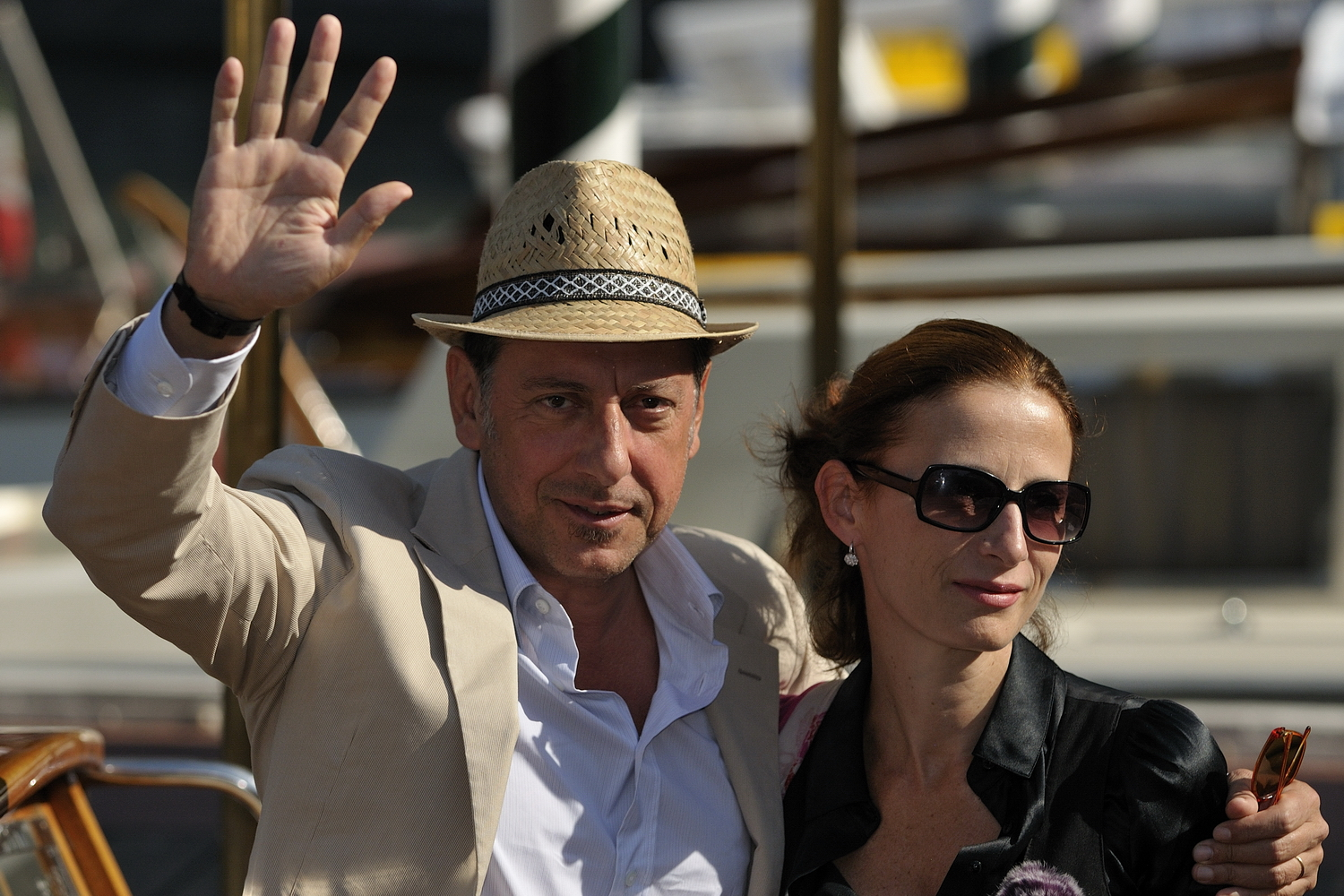 66ème Festival du Cinéma de Venise (Mostra), 6ème jour (07/09/2009) Sergio Castellitto